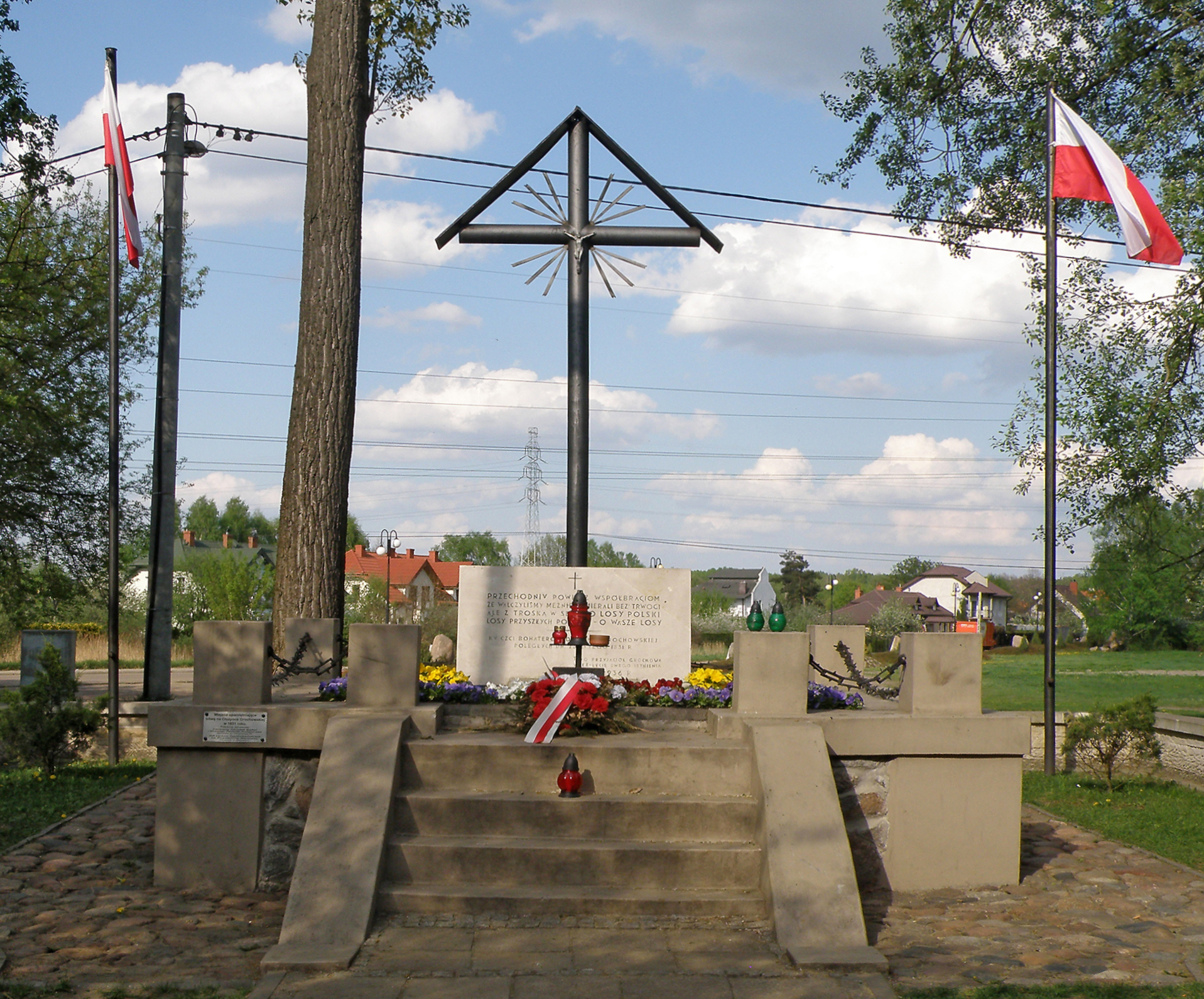 Kurhan poległych pod Olszynką Grochowską. Położenie: las przy skrzyżowaniu ulicy Szerokiej z Traczy